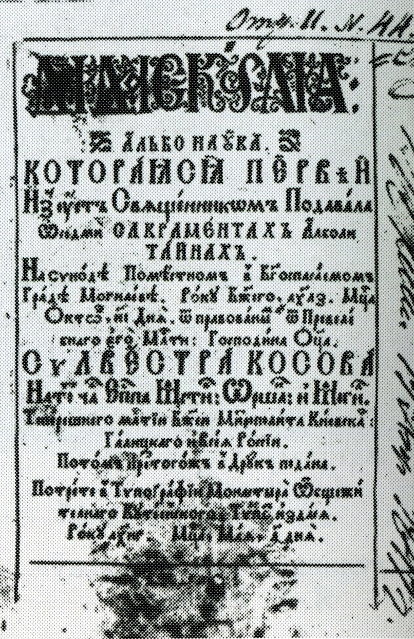 Тытульны аркуш «Дыдаскаліі» Сільвестра КосаваБеларуская (тарашкевіца): Тытульны аркуш «Дыдаскаліі» Сыльвэстра Косава